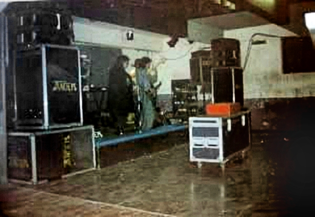 stage, pa and dancefloor of forum enger 1985